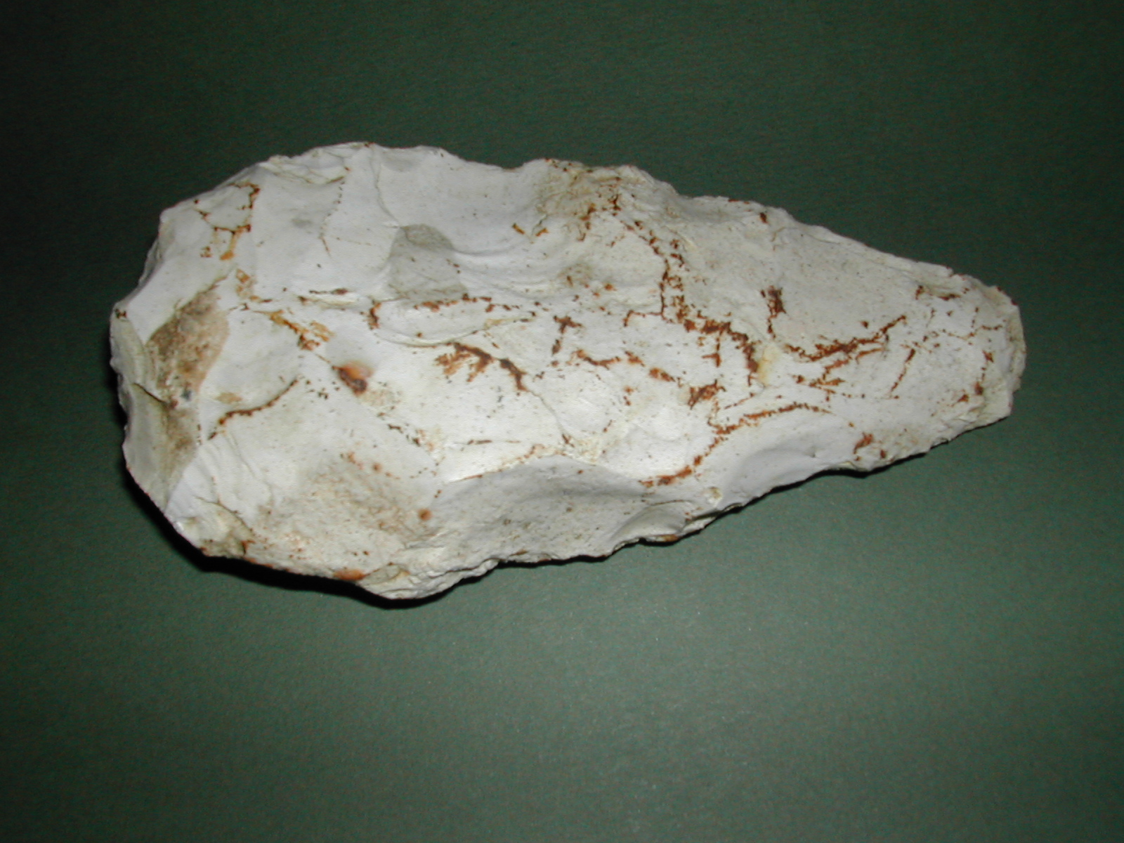 Ochancourt (Somme, France), silex façonné au paléolithique, trouvé par un chasseur (des temps modernes).